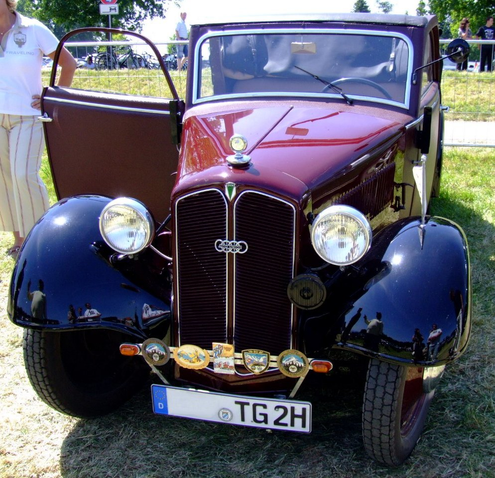 DKW F8 Quelle: selbst fotografiert, 07/2006 Fotograf: Späth Chr.